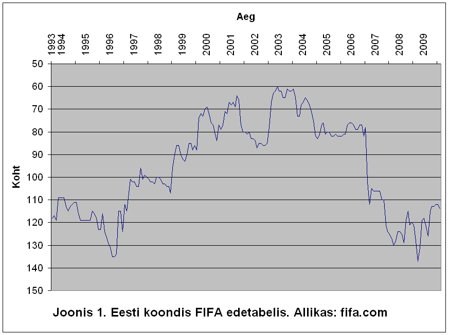 Tabel näitab Eesti jalgpallikoondise asetust FIFA edetabelis. Allikas